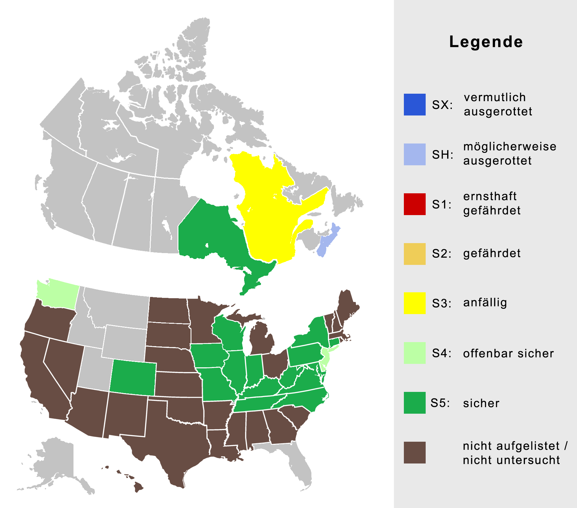 Schutzstatus der Wanderlibelle in Nordamerika